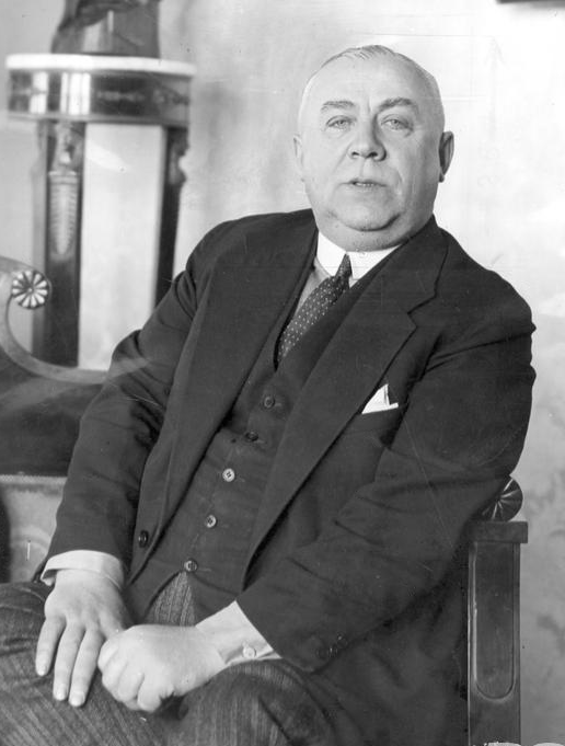 Stefan Ossowiecki (inżynier, jasnowidz) w swoim mieszkaniu